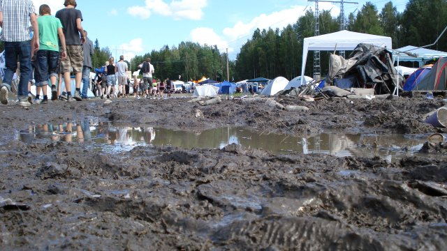 Mud at Arvikafestivalen